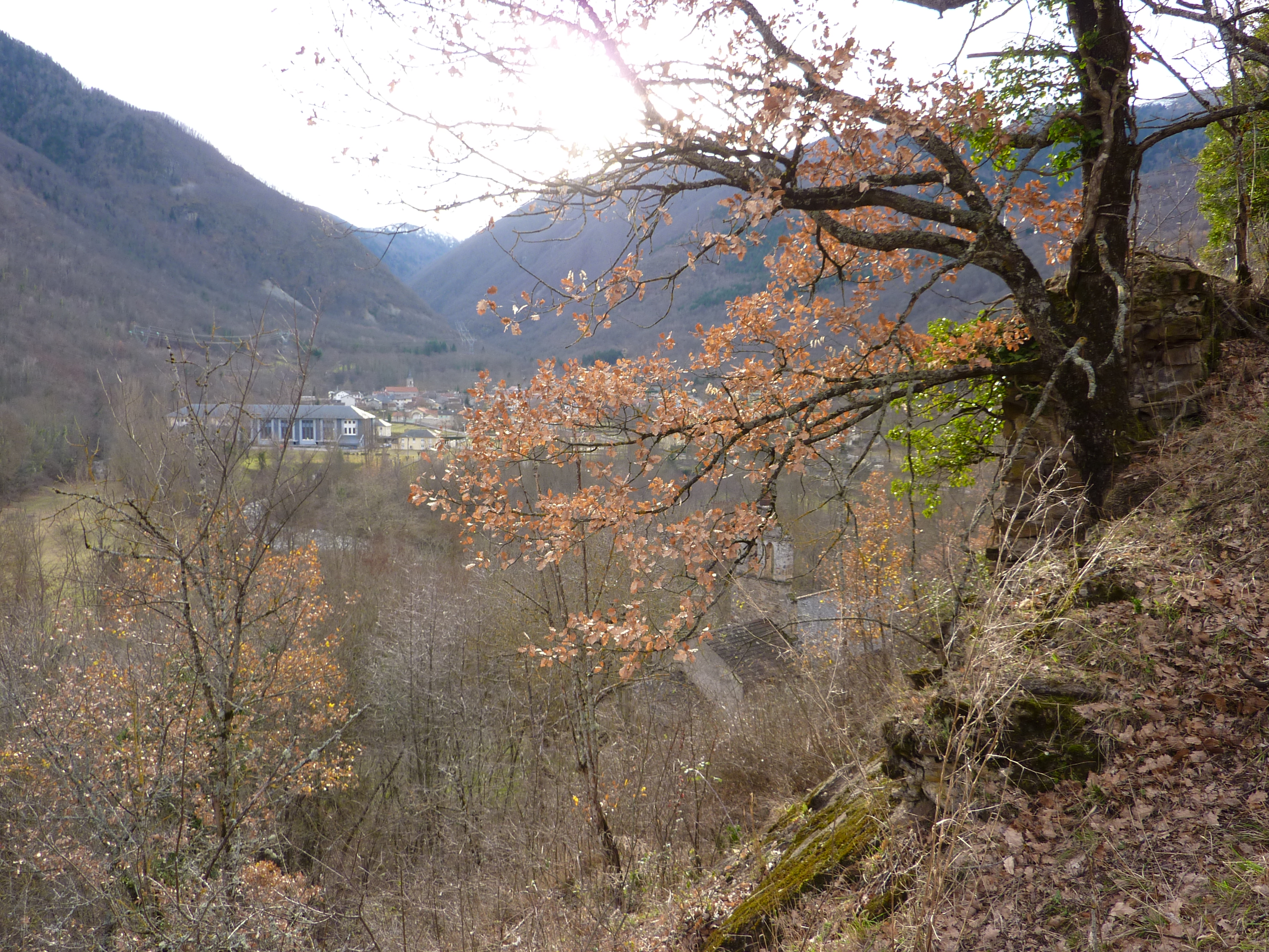 Ruines du château féodal de Château-Verdun.